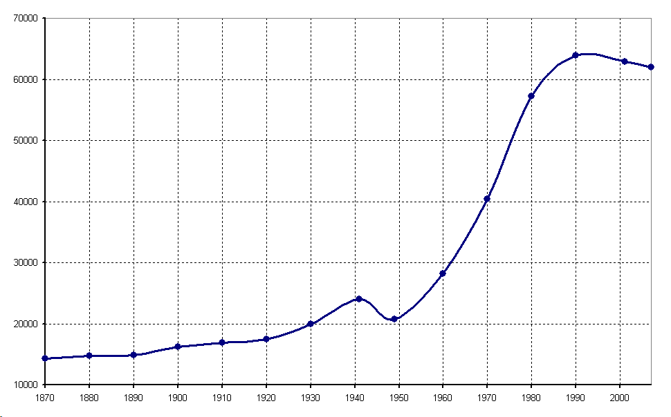 Veszprém's population (1870-2007).